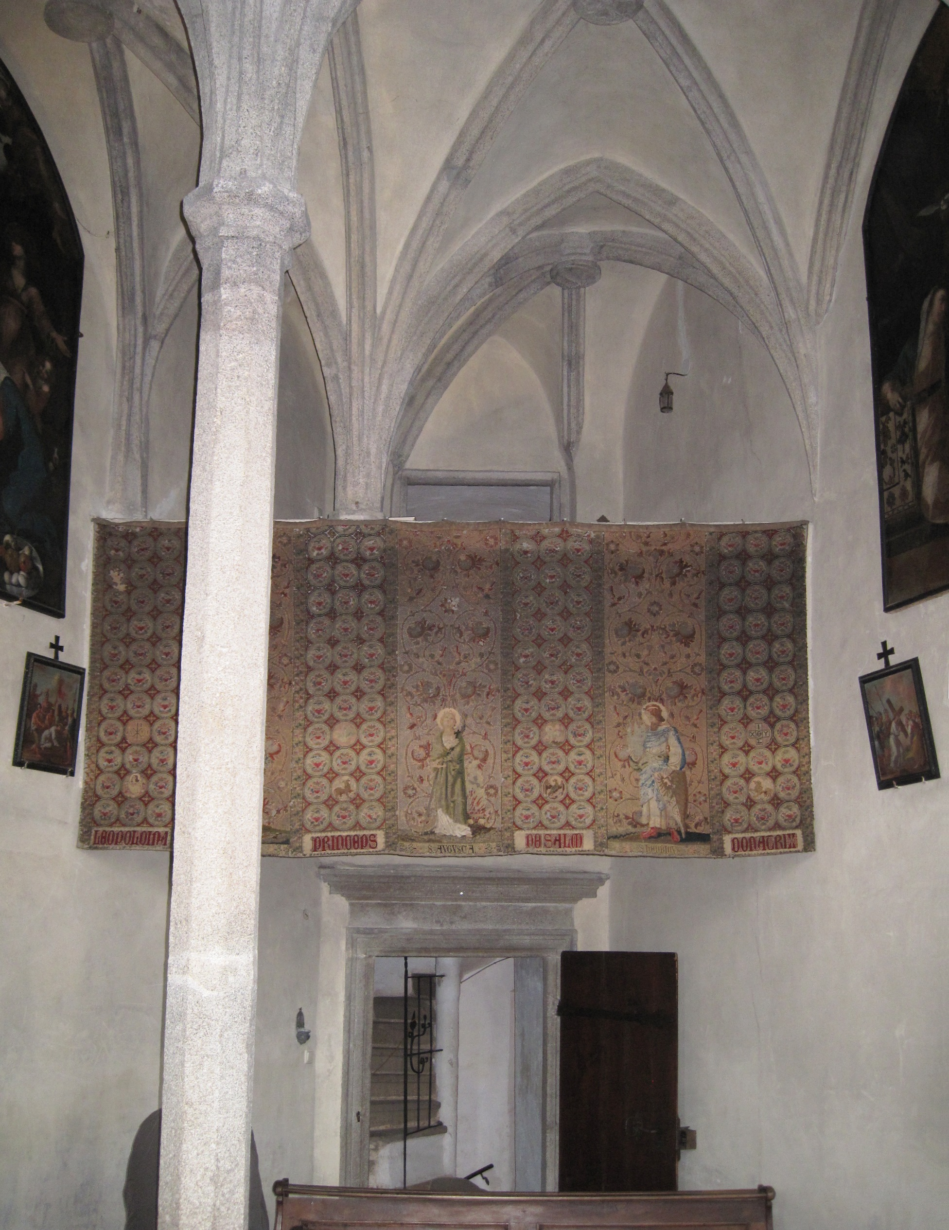 Gobelin an der Emporenbrüstung der Kapelle aus dem 15. Jahrhundert der Burg Clam in Klam im Bezirk Perg in Oberösterreich.